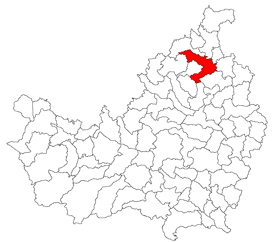 Categorie:Hărţi ale judeţului Cluj